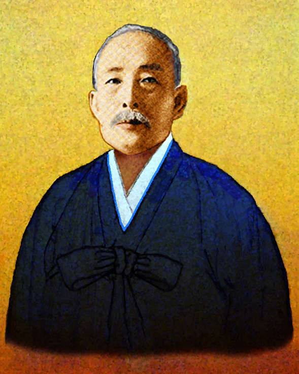 해악 박중양 선생 영정, 직접 그림